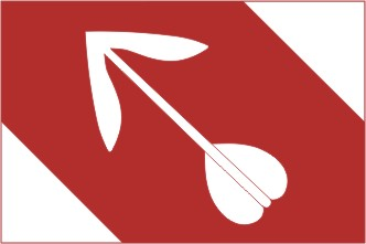 Křemže